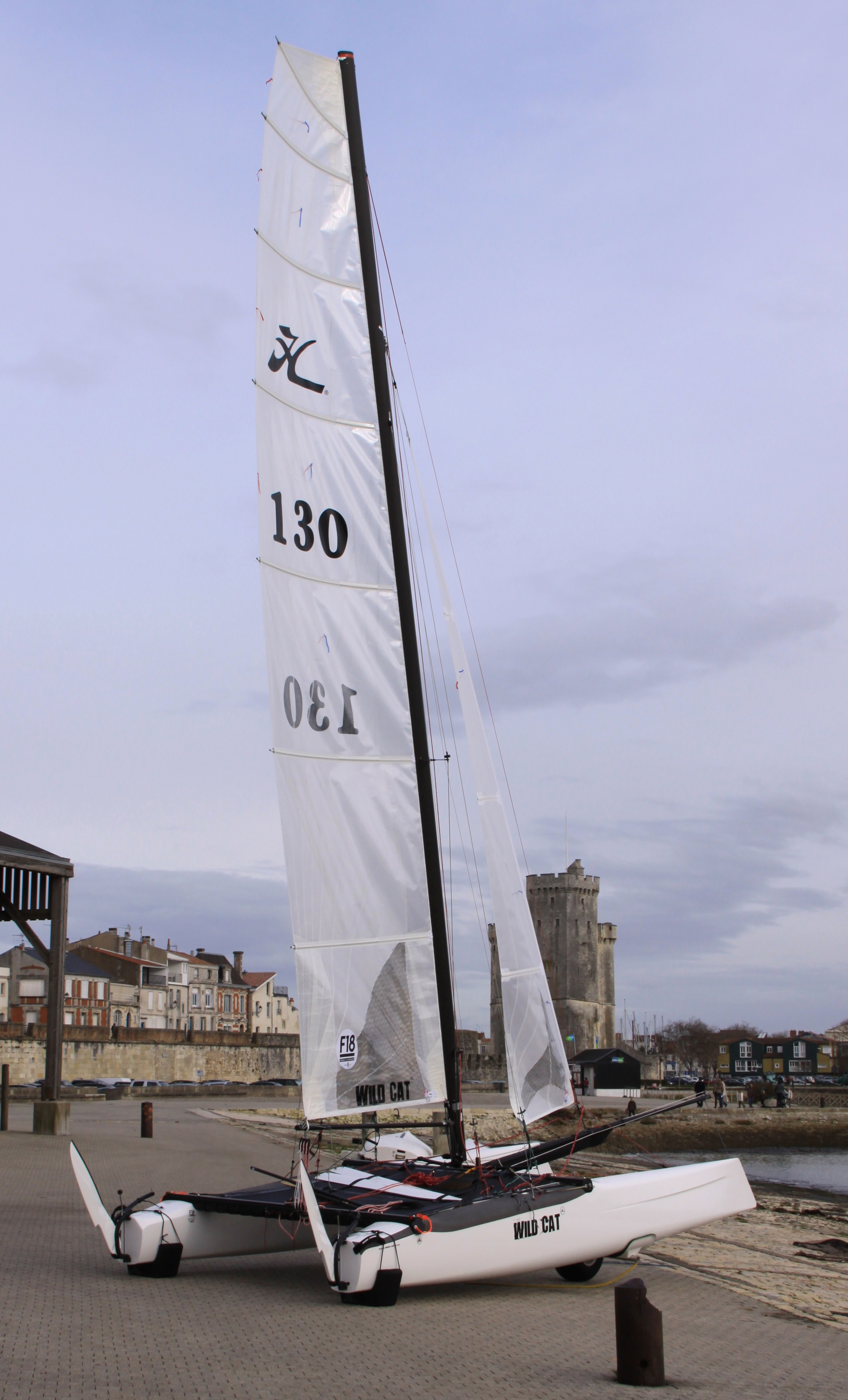 Un "Wild Cat", la nouvelle version sortie en 2009 du catamaran de sport de la classe Formula 18. Ce modèle est construit par Hobie Cat Europe. Quelques caractéristiques techniques du "Wild Cat": longueur 5,52 m, largeur 2,60 m, hauteur du mât 9 m, grand voile 17 m2, foc 4,15 m2, spinnaker 19/21 m2, poids complet 180kg. L' architecte de cette version du F 18 est Martin Fisher. Cette photographie a été prise au Centre Nautique des écoles de voile à La Rochelle, France.